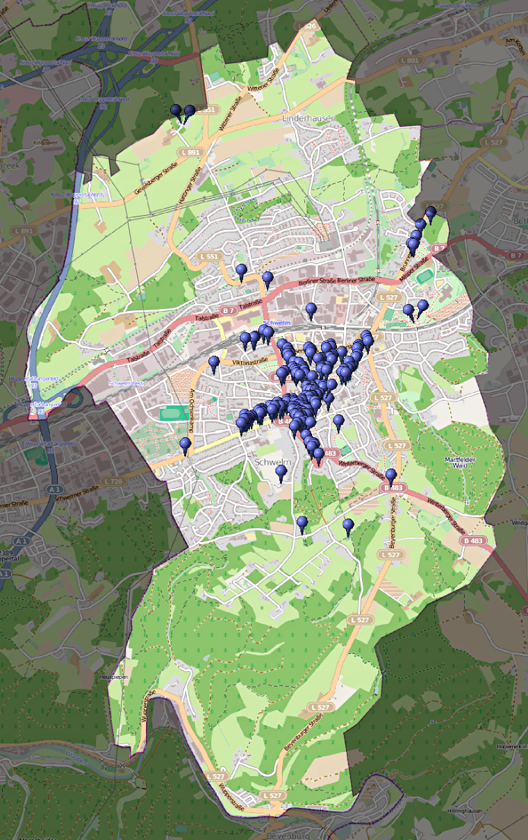 Karte der Lage der Baudenkmäler in Schwelm (ausgenommen das linienhafte Denkmal Nr. 160 „Bergisch-Märkische Eisenbahn“), Stand Februar 2013